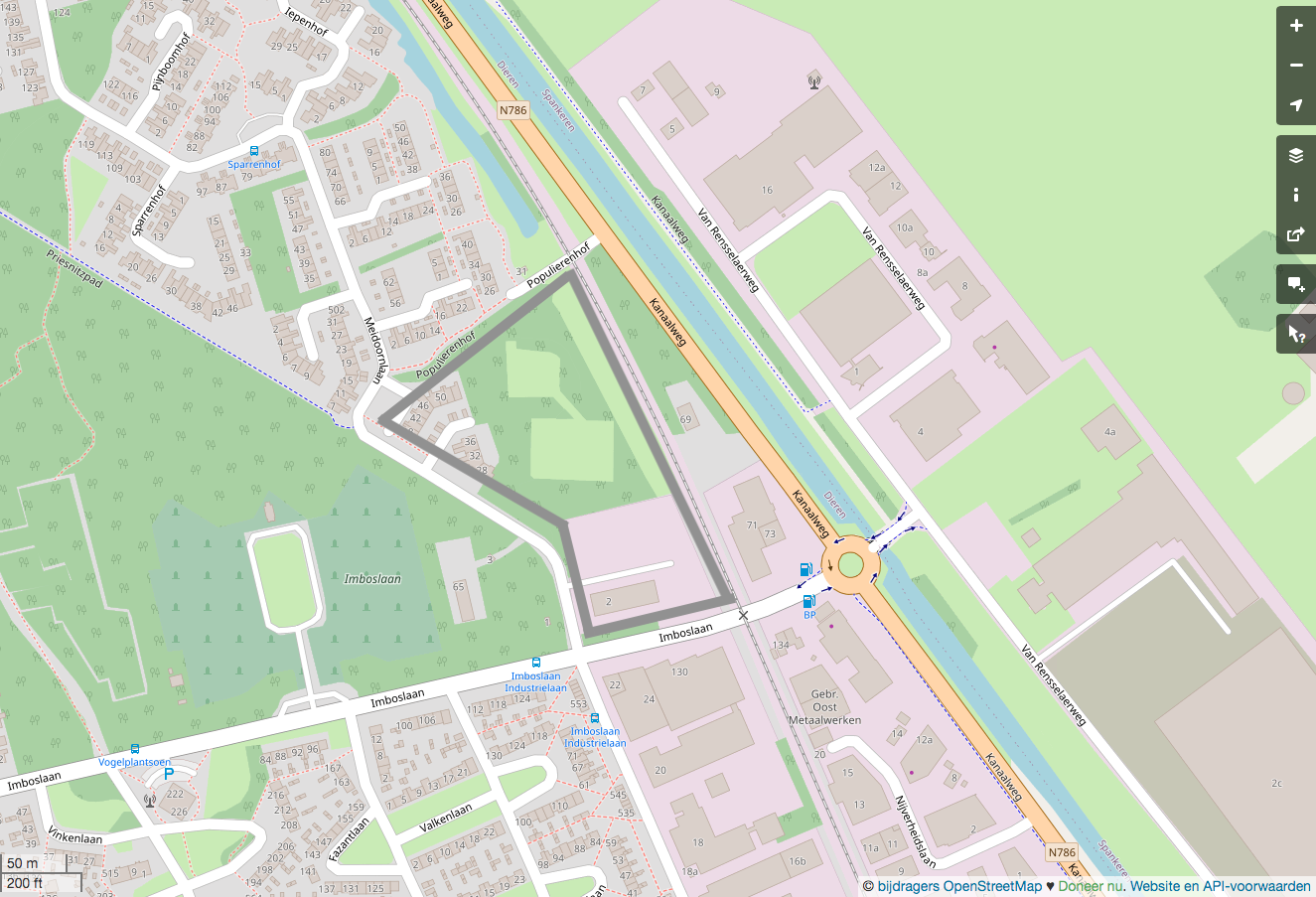 De grijze lijn geeft globaal het gebied aangeduid met "Het Zandgat” in Dieren (Gelderland) aan.